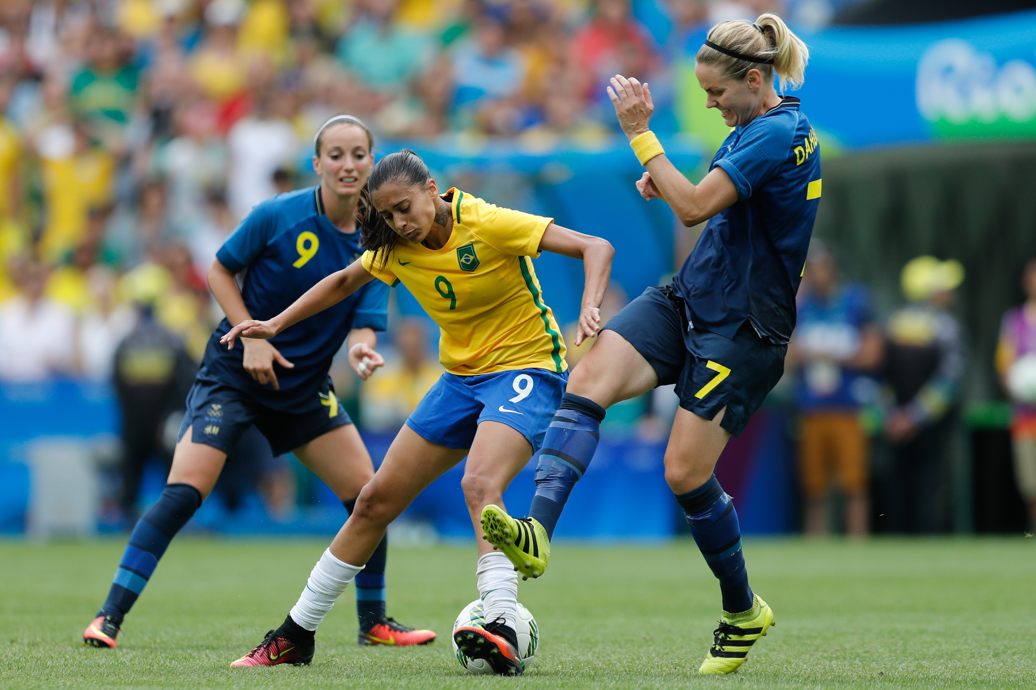 Rio de Janeiro - Seleção brasileira de futebol feminino disputa semifinal com a Suécia, no Maracanã. O Brasil perde nos pênaltis e vai disputar o bronze (Fernando Frazão/Agência Brasil)